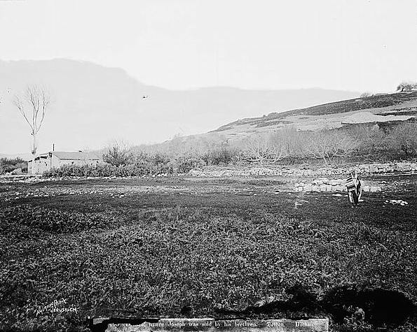 כותר מקורי Dothan, where Joseph was sold by his brethren